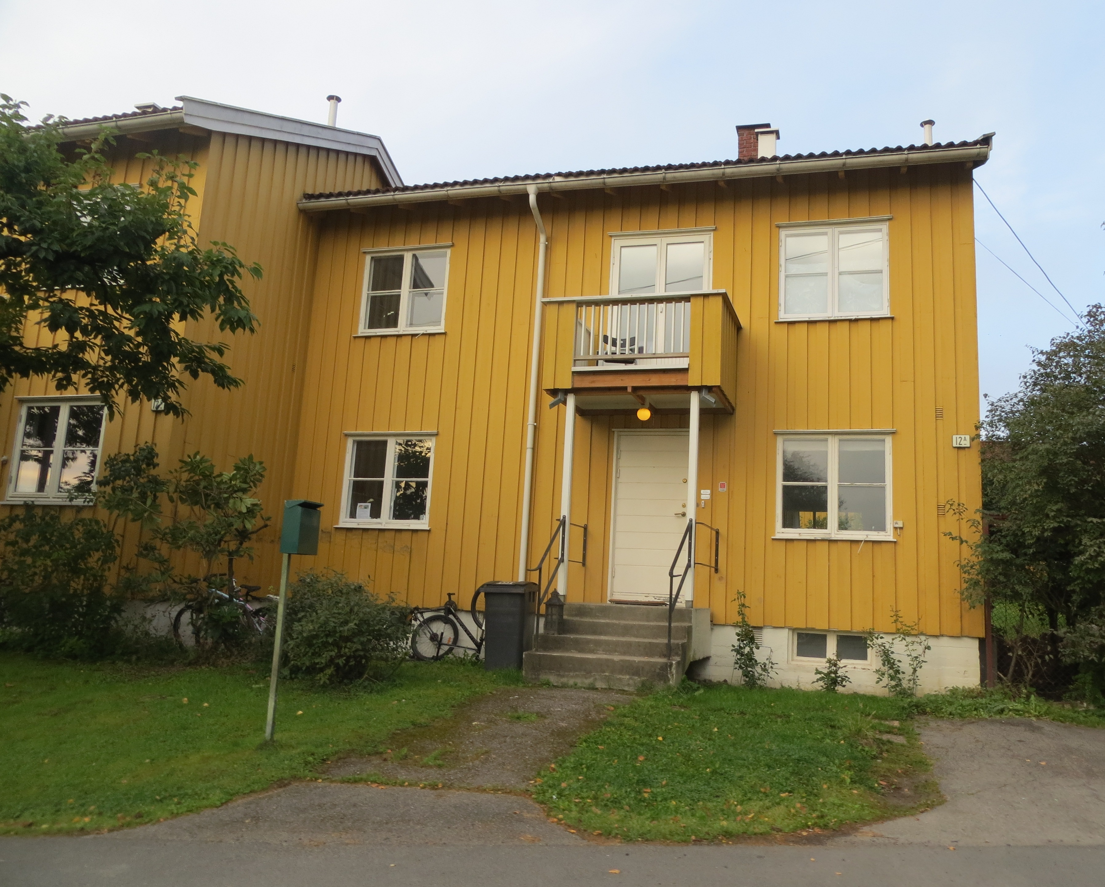 Bolig i nordvestre del av Husebygrenda, hele boligområdet har lokalt listeført bygningsvern. Bydel Vestre Aker, Oslo.